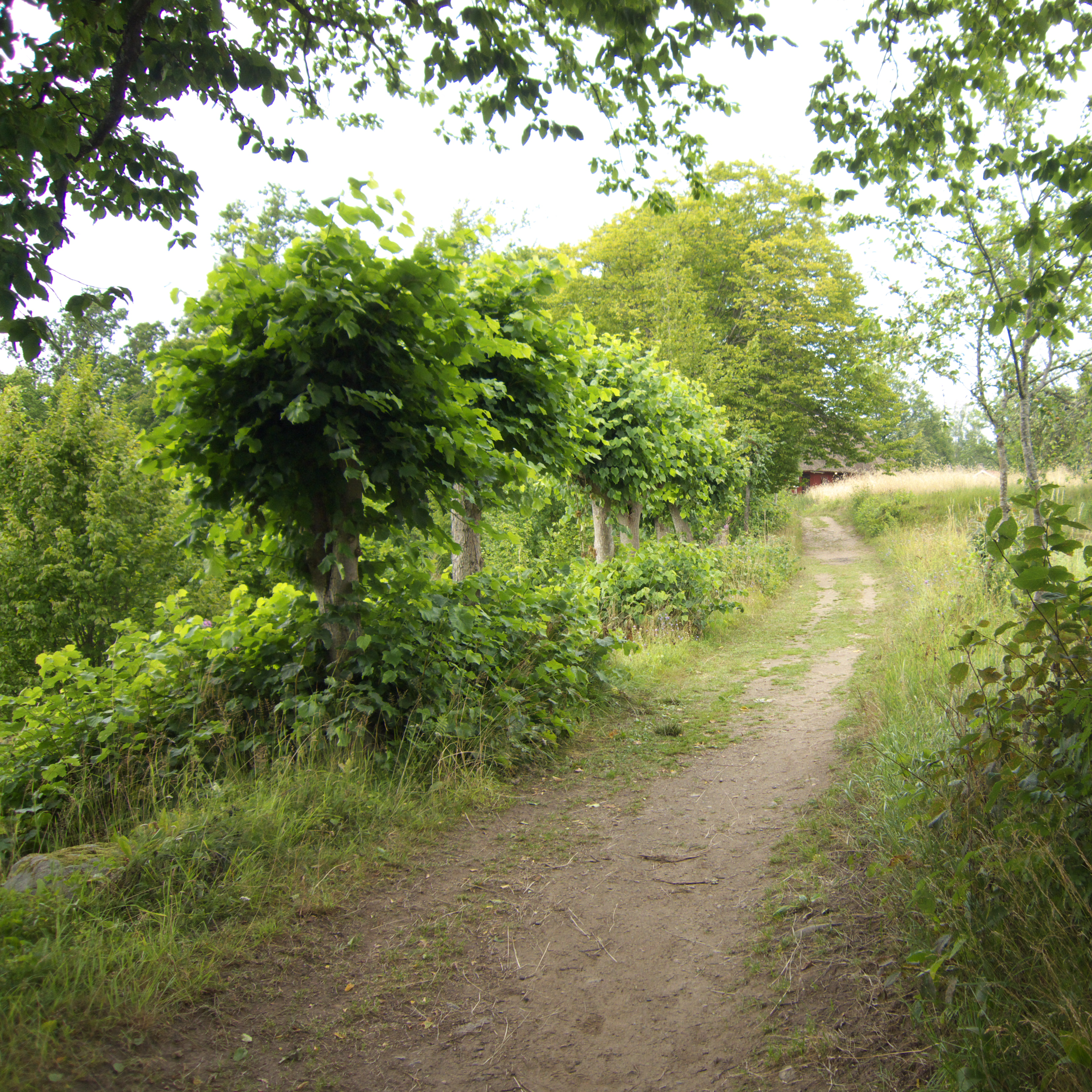 Kulturreservatet Linnés Råshult - hamlade träd